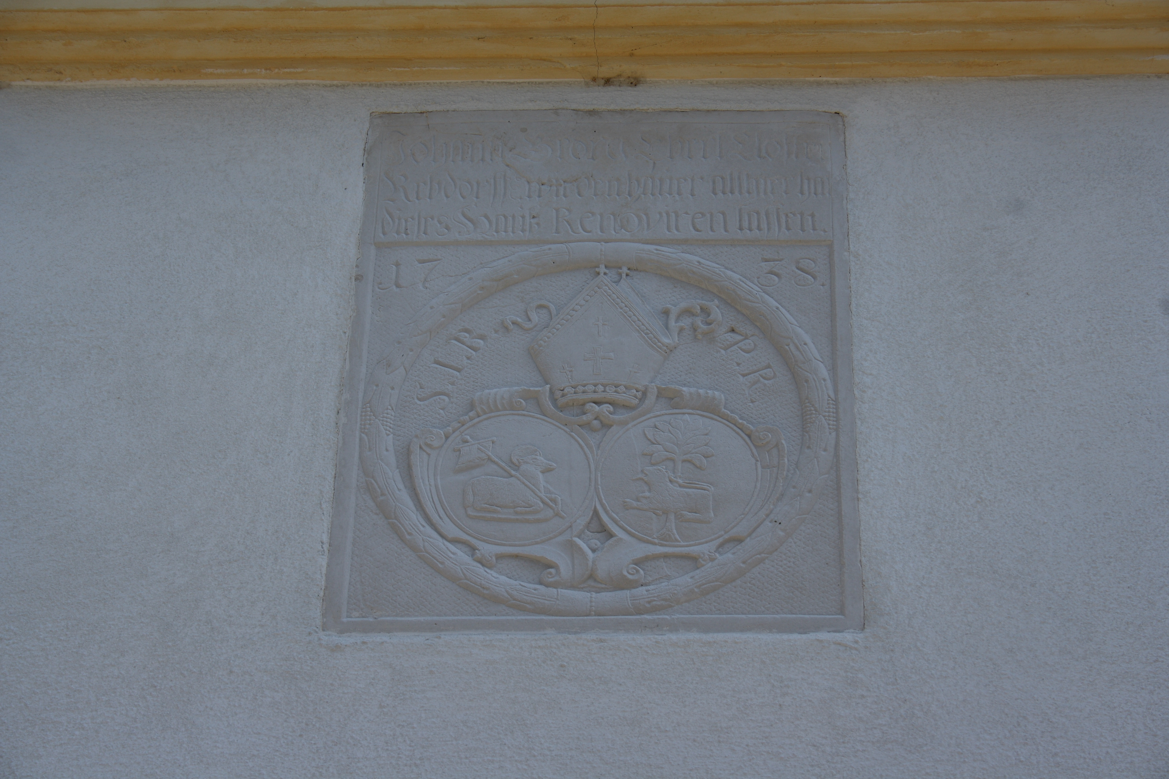 Wohnhaus in Geilsheim, einem Stadtteil von Wassertrüdingen im Landkreis Ansbach (Bayern/Mittelfranken), Geilsheim 62, Dreiseithof, ursprünglich von 1647, Wappenstein des Klosters Rebdorf mit der Jahreszahl 1738